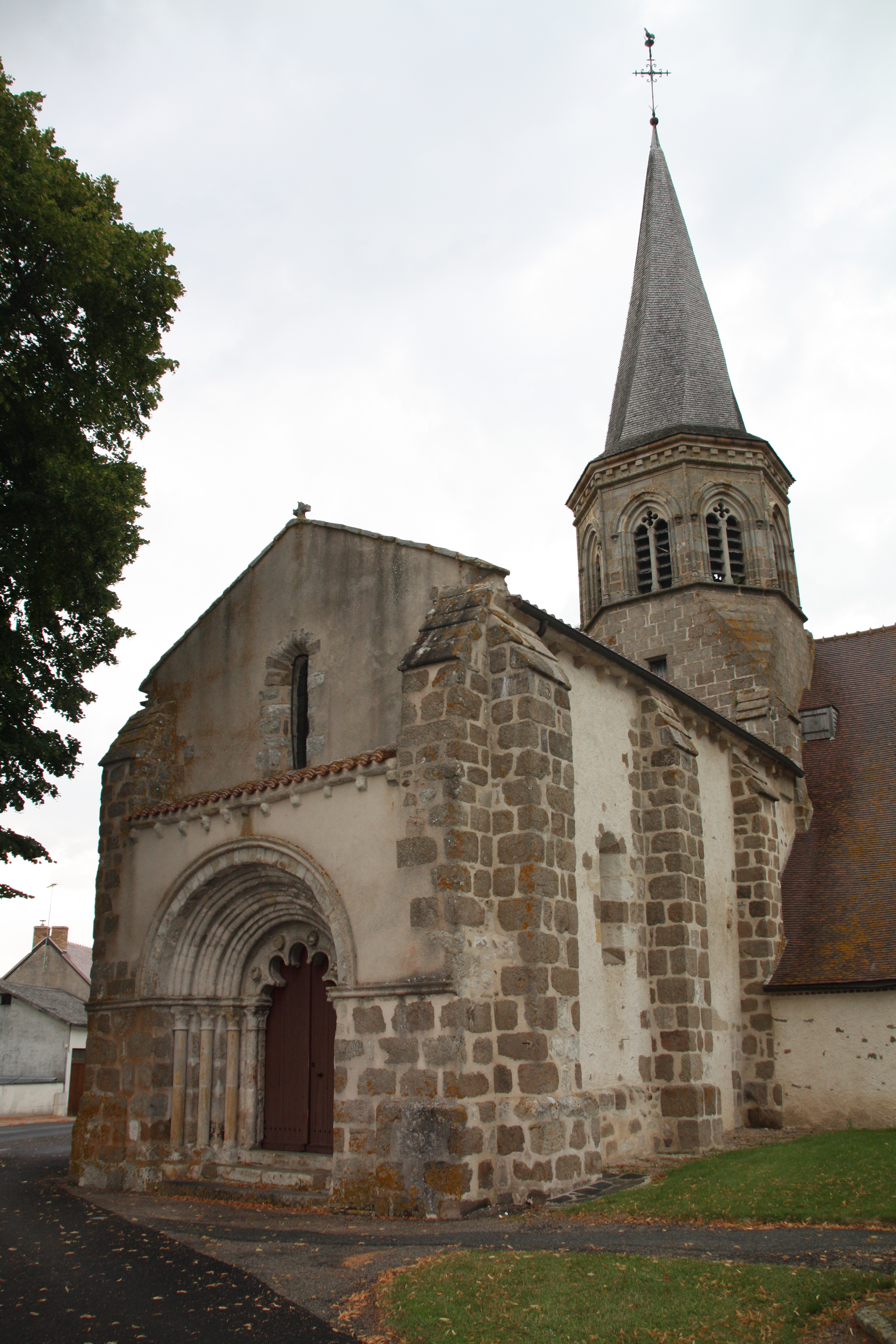 Église de Saint-Bonnet-de-Four, France